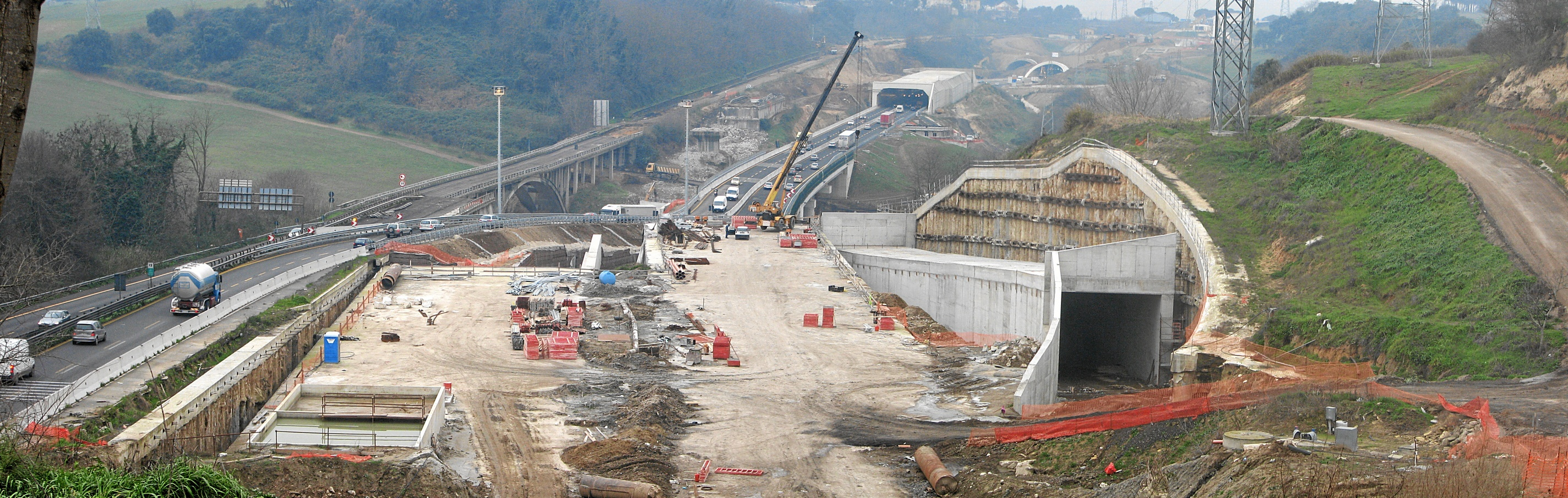 Grande Raccordo Anulare, lavori altezza Via Cassia